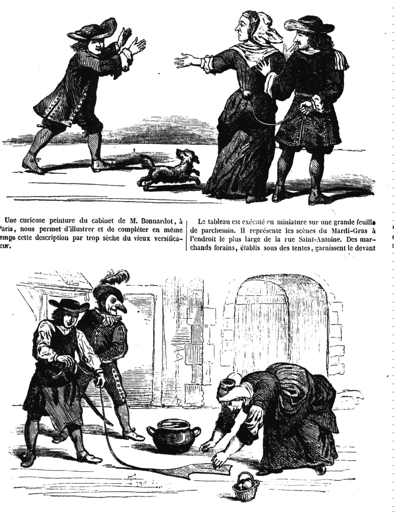 Reproduction gravée en 1852, de détails d'une gouache du XVIIème siècle, représentant, en miniatures sur parchemin, des scènes du Mardi Gras, rue Saint-Antoine, à Paris. Cette oeuvre était conservée, en 1852, dans la collection de M. Bonnardot.